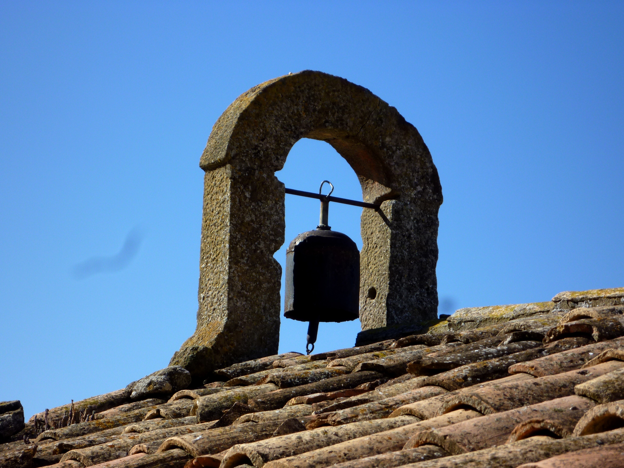 Capella de Sant Josep de Politg (la Baronia de Rialb): espadanya amb un obús per campana